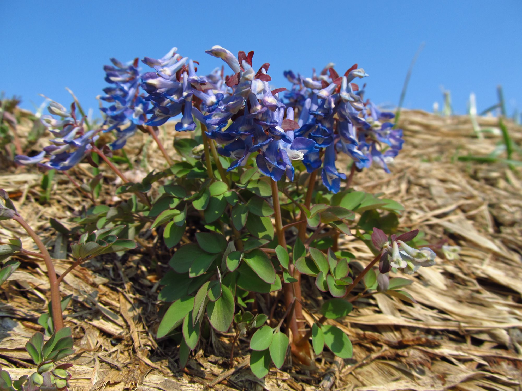 2014年4月撮影。